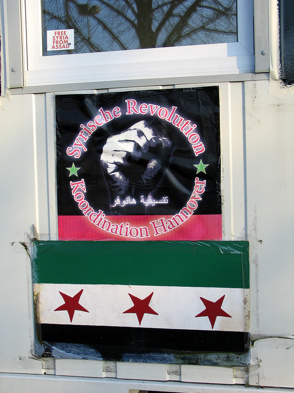 Plakat mit dem Schriftzug Syrische Revolution, Koordination Hannover, hier am Container neben dem Niedersächsischen Ministerium für Wirtschaft, Arbeit und Verkehr ...